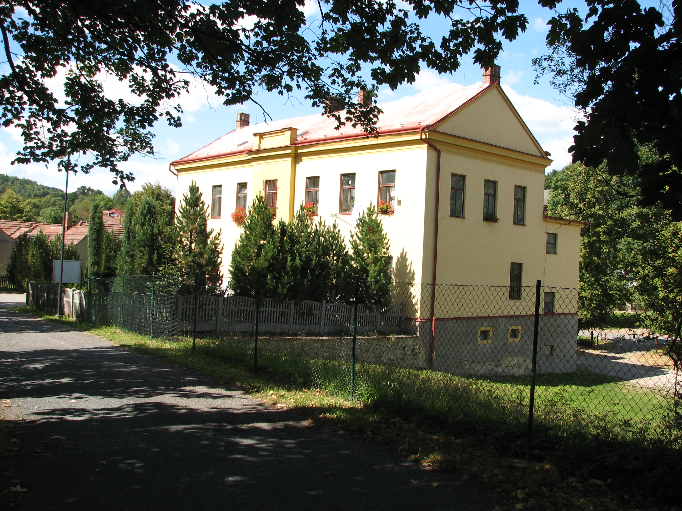 Budova obecního úřadu, pošty a obecní knihovny v obci Březina (okres Svitavy).